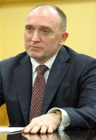 Губернатор Челябинской области Борис Дубровский